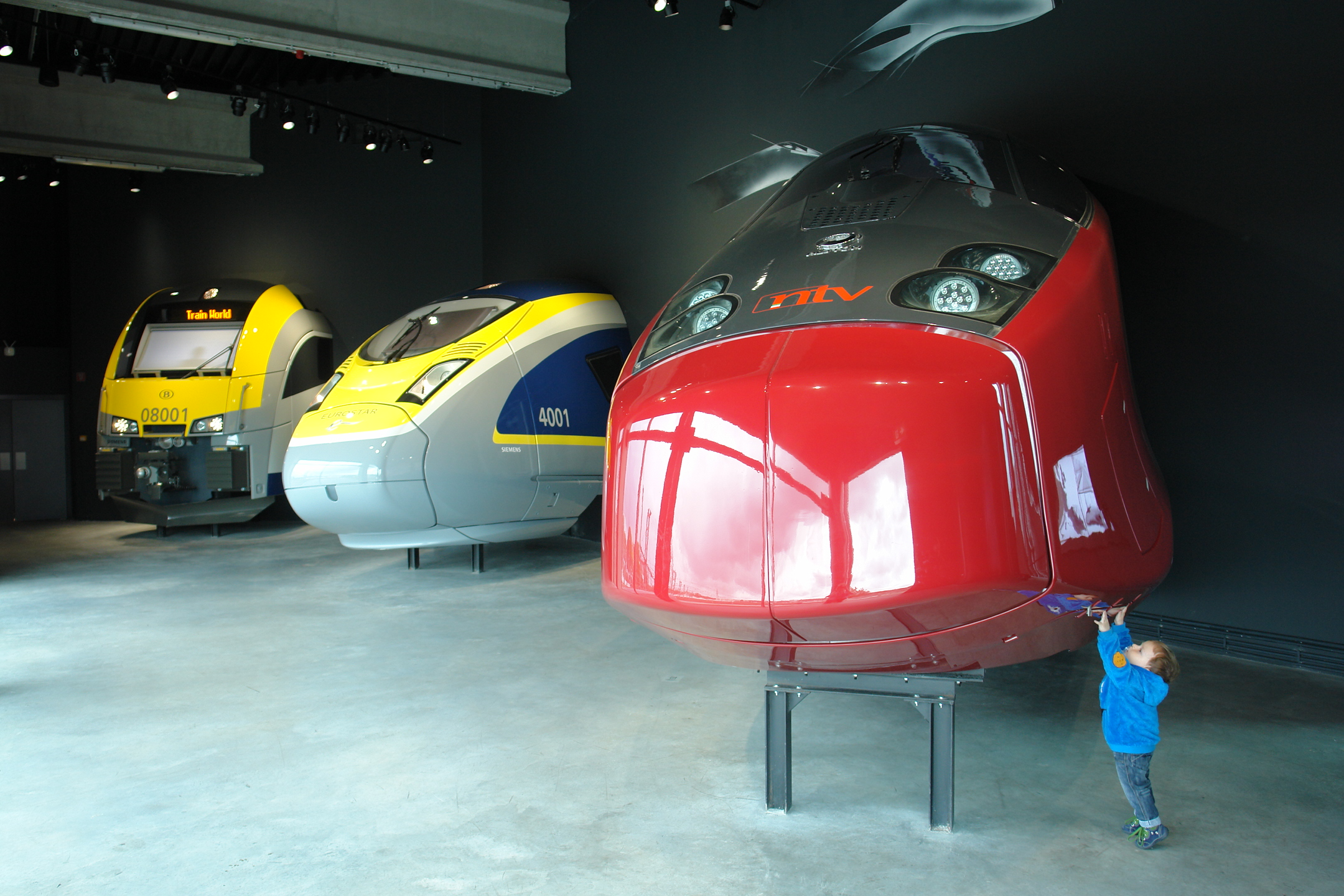 Train World, railway museum in Brussels